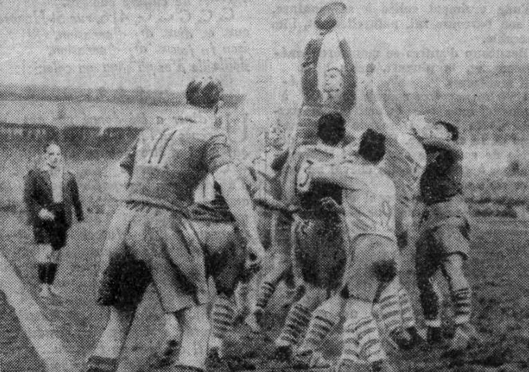 Championnat de France de rugby 1937, Vienne - Montferrand, sur une touche, un avant montferrandais prend possession du ballon.